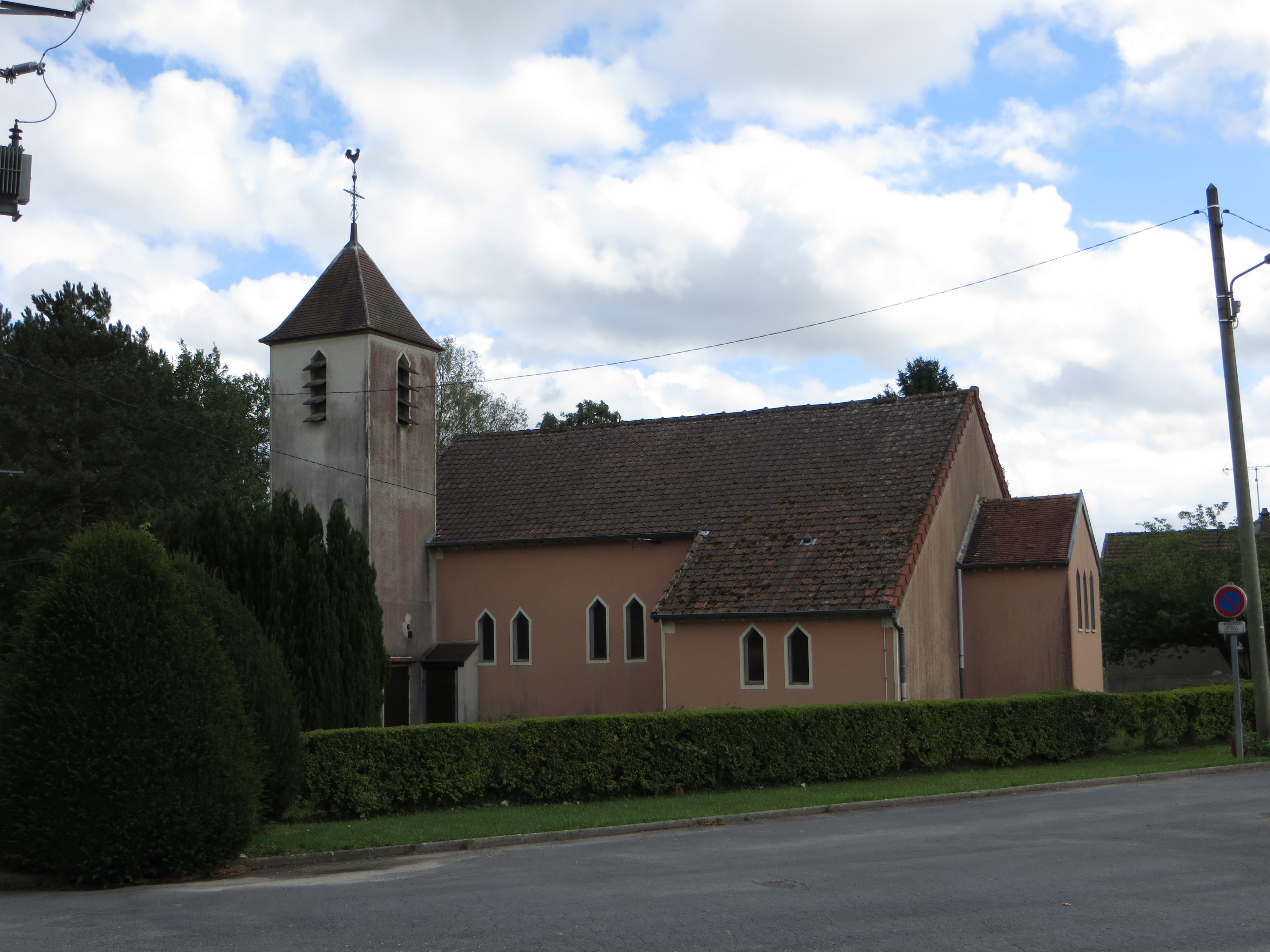 Vue de l'église